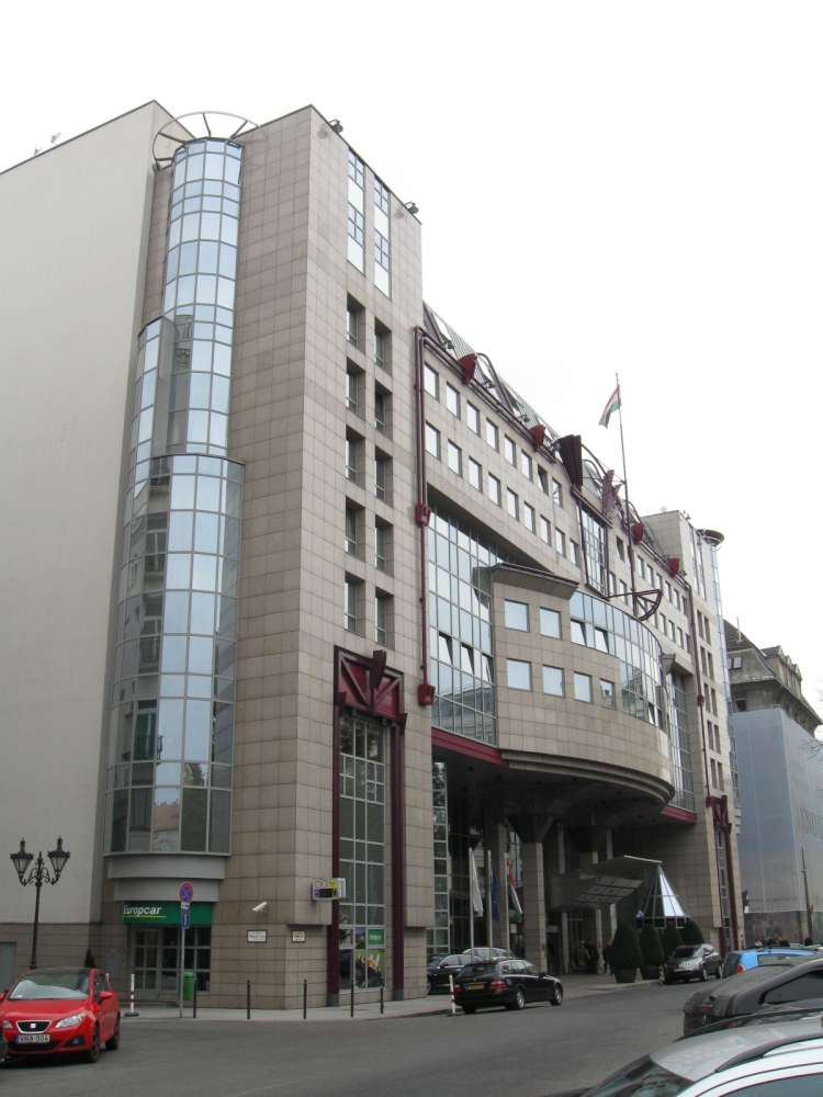 Kempinski Hotel Corvinus (Budapest, V. ker., Erzsébet tér 7-8.)